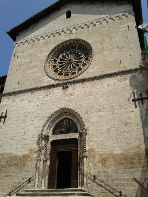 Chiesa di San Francesco